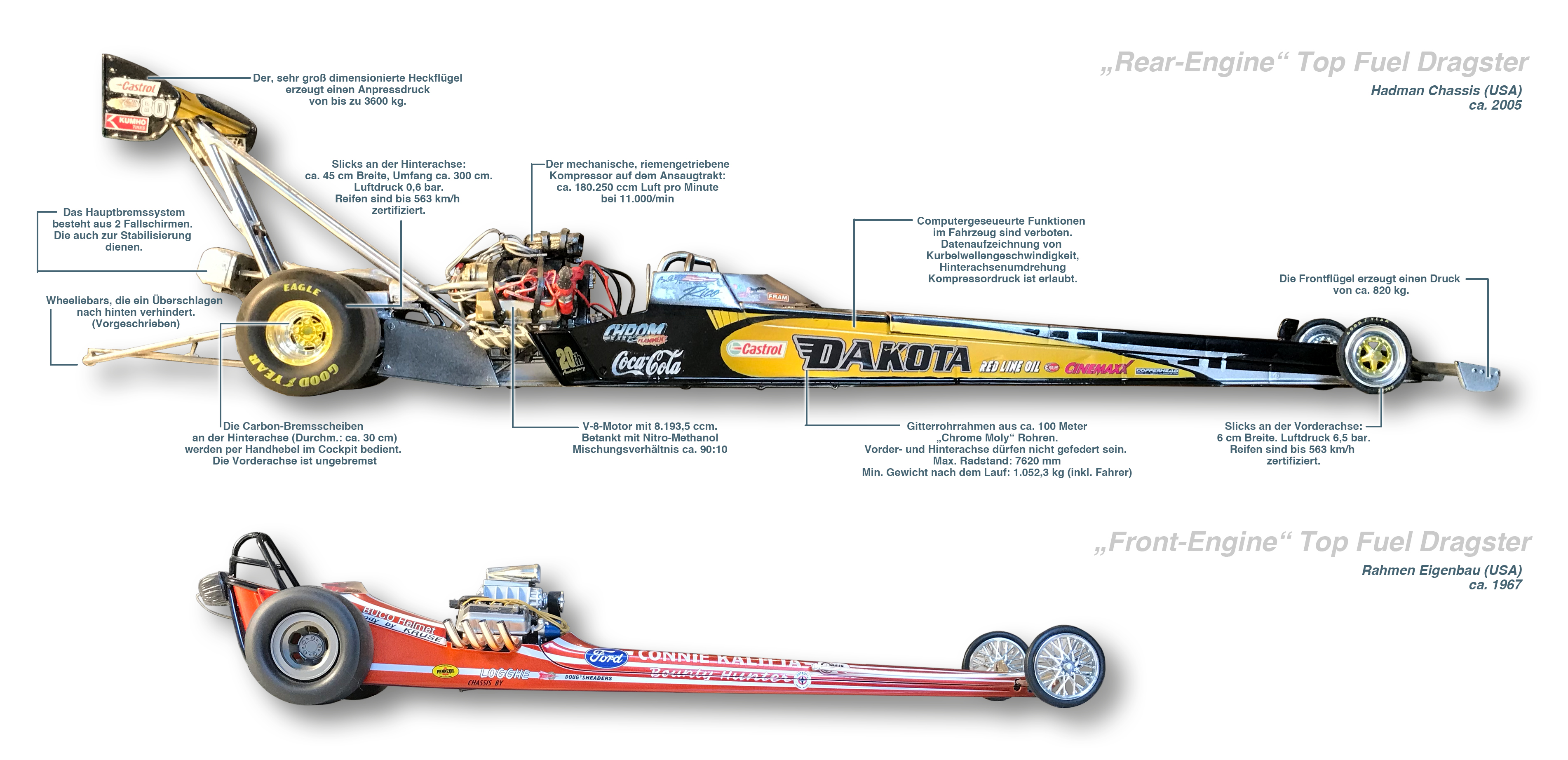 Technische Informationen zu einem Top Fuel Dragster in Rear-Engine-Bauweise. Zum Vergleich dazu ein Front-Engine im gleichen Abbildungsmaßstab.